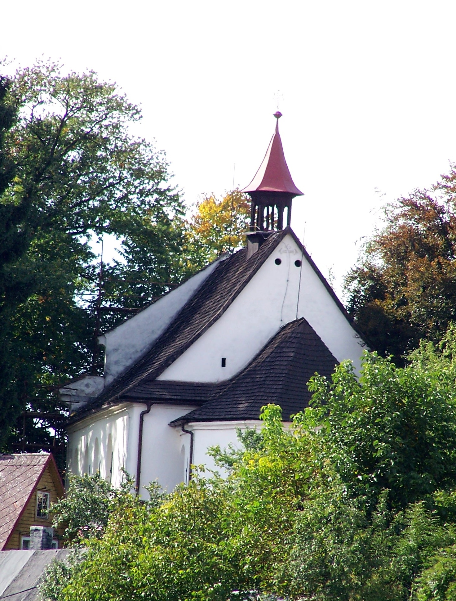 Kostel Panny Marie (Opočno), Kodymova, Opočno